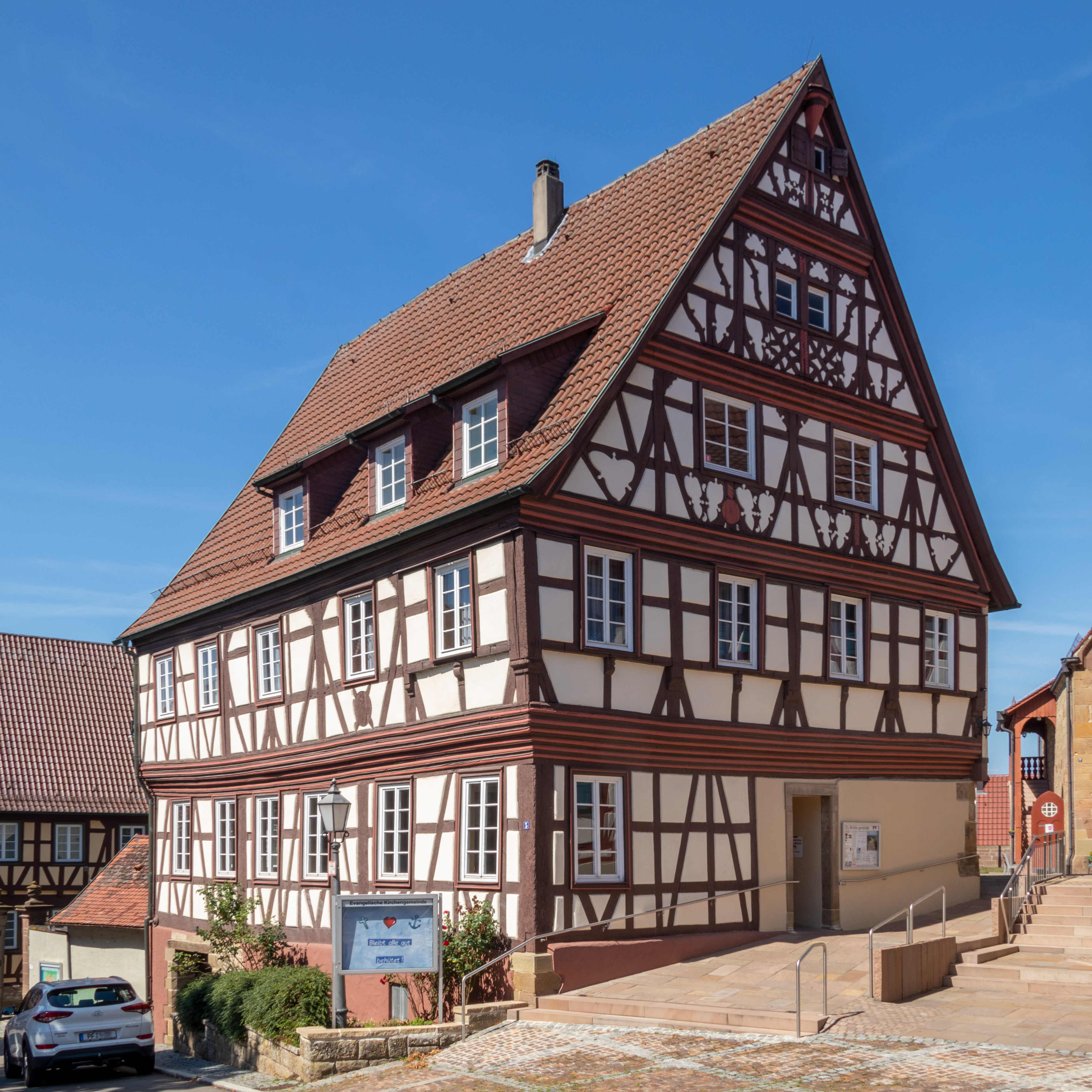 Denkmalgeschützes Fachwerkhaus in Ötisheim - Giebel und östliche Traufenseite.